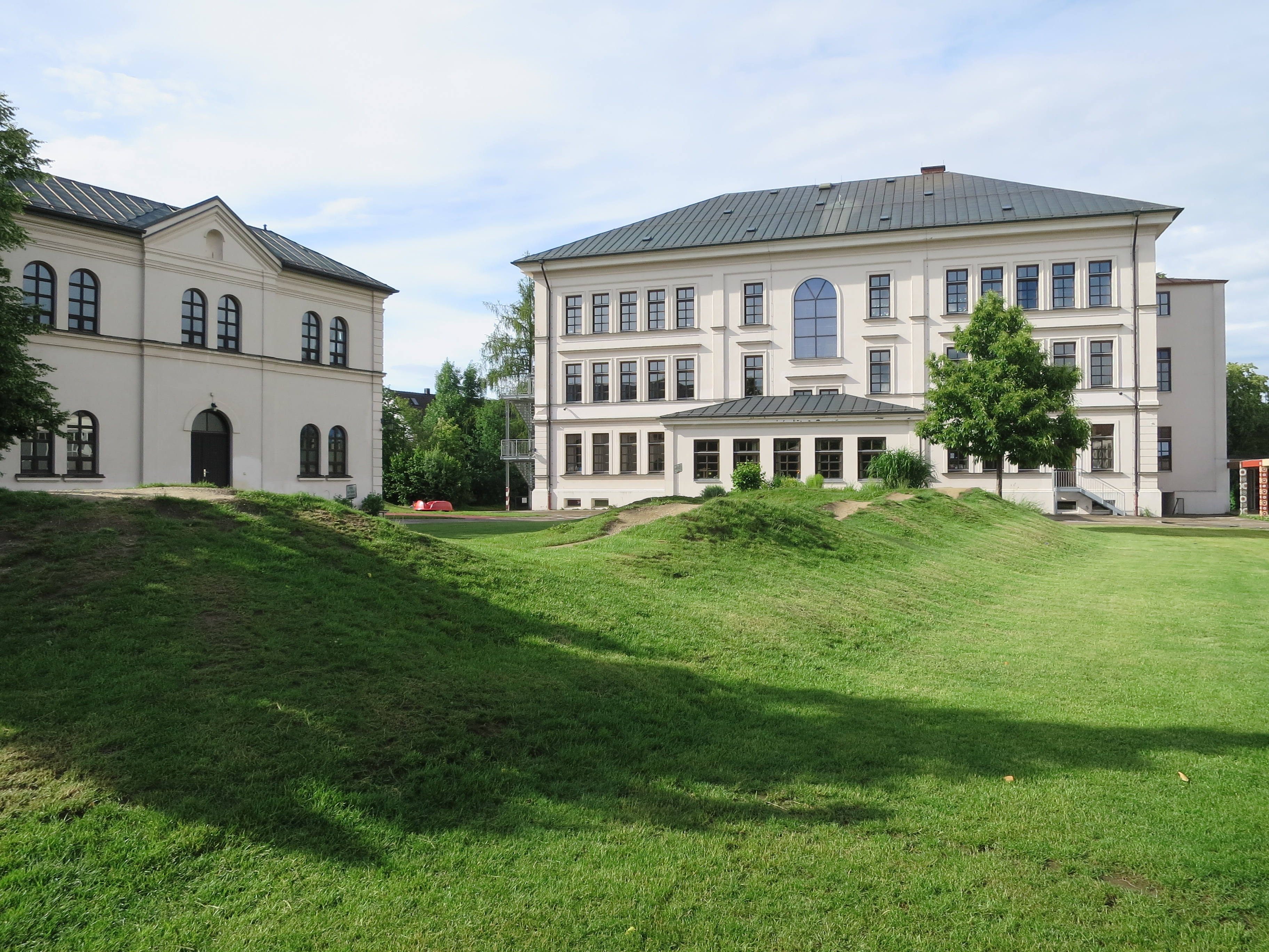 Die Rückseite der Schule mit der Turnhalle